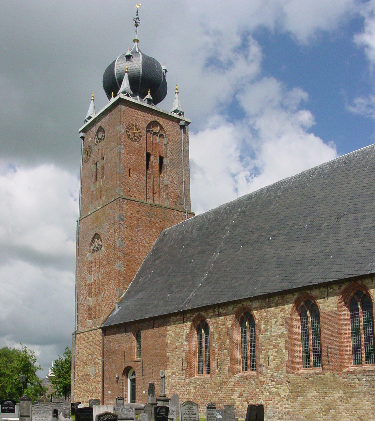 Op deze foto is de kerk in het dorp Deinum te zien. De kerk is bekend vanwege de ui die op de toren te zien is.